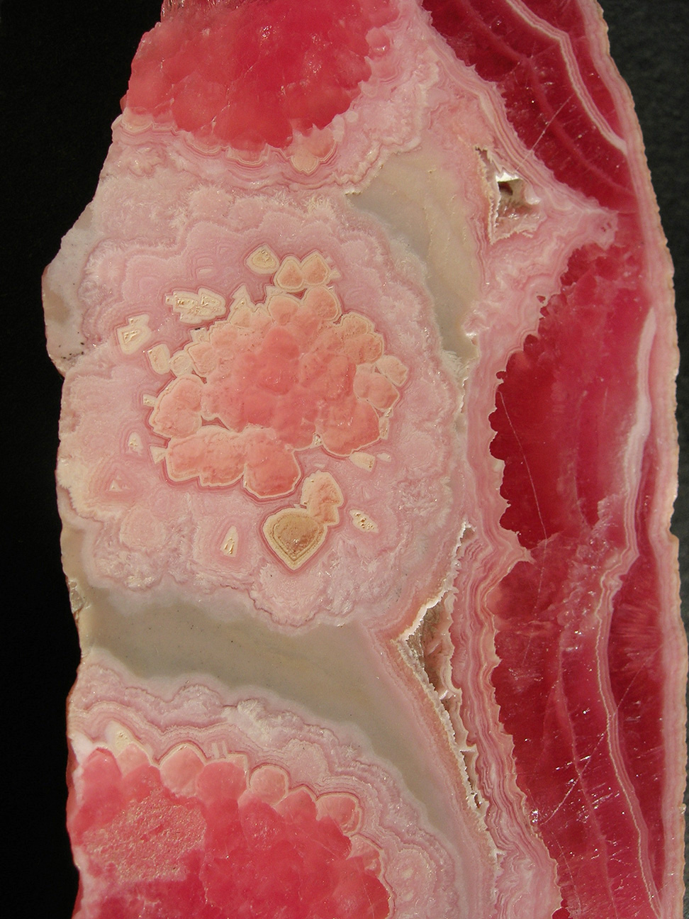 Rhodochrosite